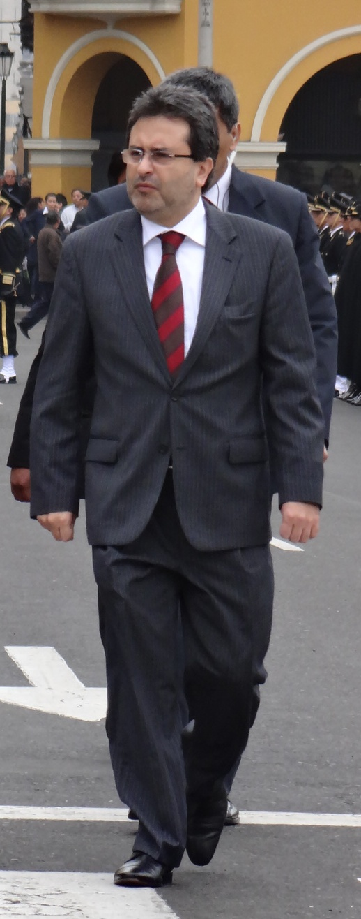 Juan Jimenez Mayor, Presidente del Consejo de Ministros del Perú, saliendo de la ceremonia por la festividad de Santa Rosa de Lima en la Plaza de Armas de Lima, Perú